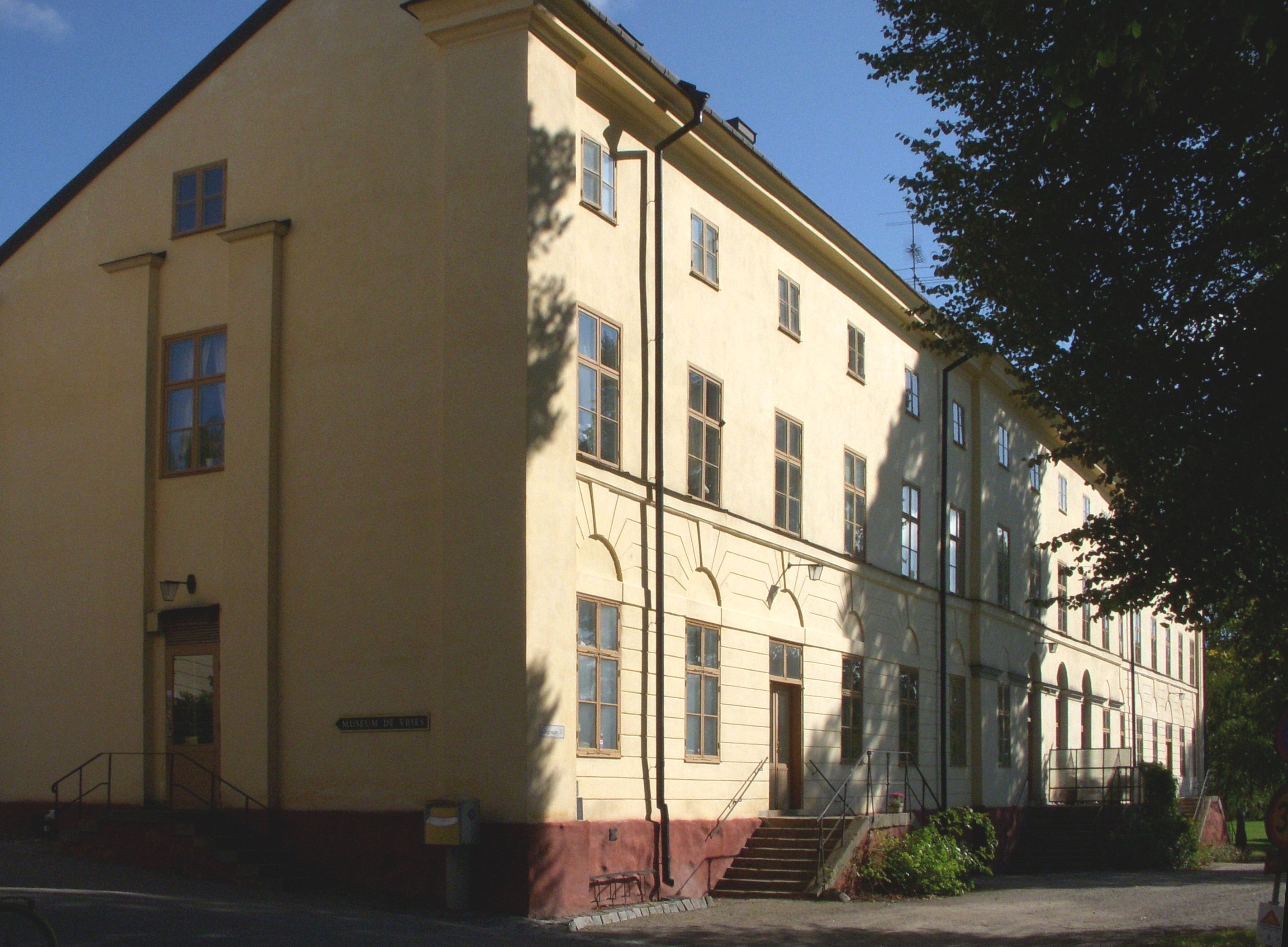 Långa raden 3 " på Drottningholmsmalen "Kavaljershuset"